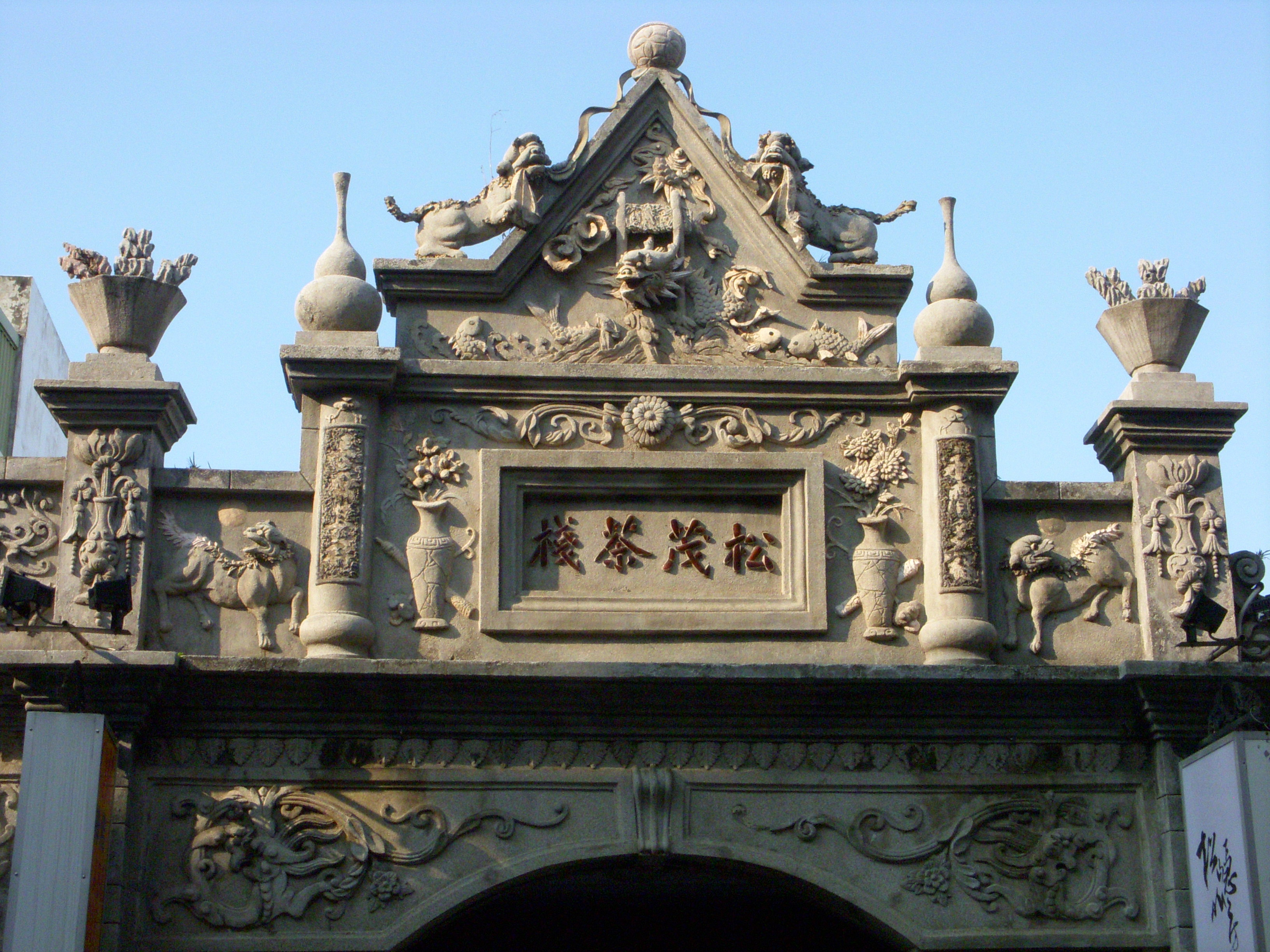 大溪鎮老街 和平路22號松茂茶棧